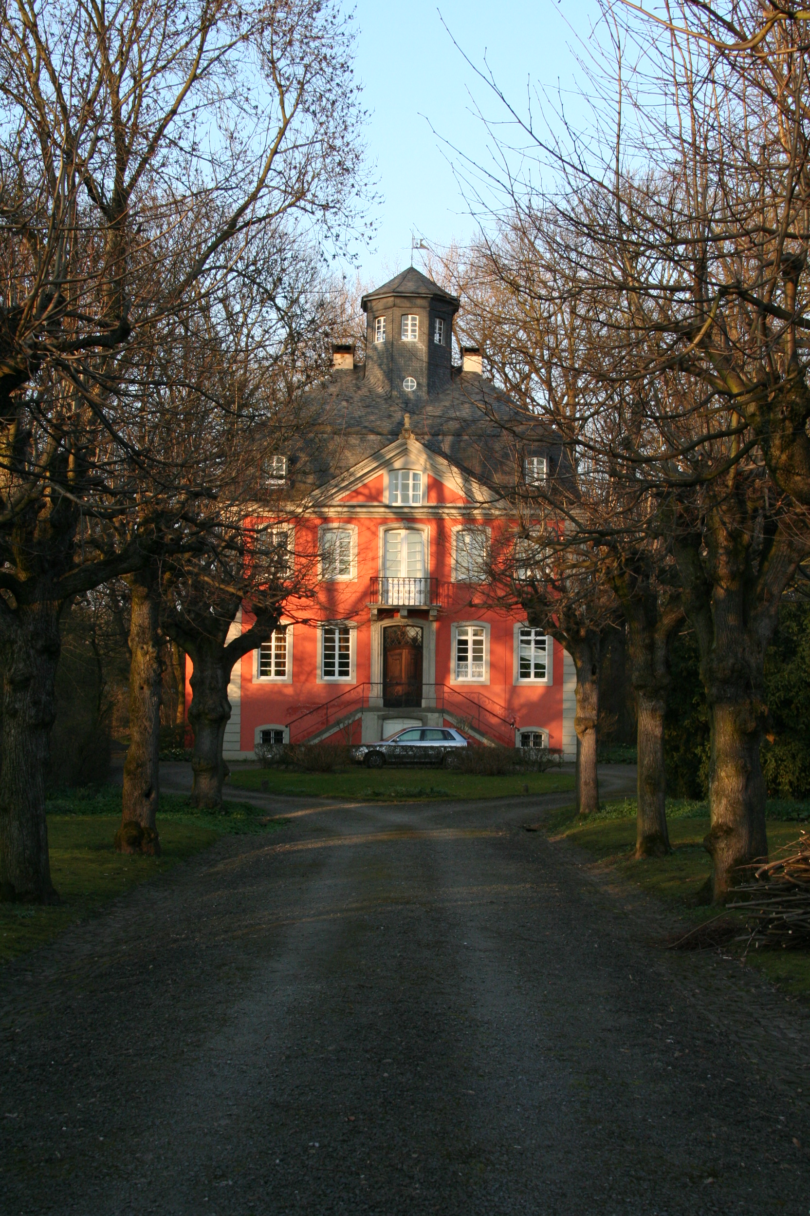 Bonn-Graurheindorf, Burg Graurheindorf